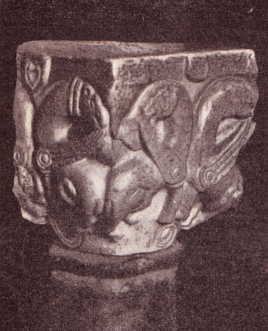 Fotografia del 1900 d'un dels dos capitells romànics conservats a Tremp (Pallars Jussà)